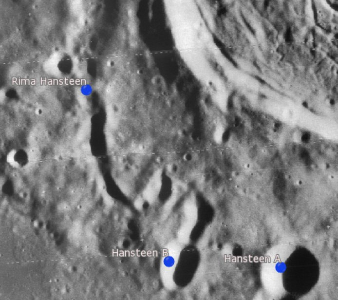 Rima lunar Hansteen. (Imagen LRO)